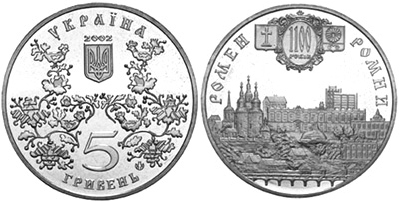 Монета выпущенная к 1100-летию города Ромны